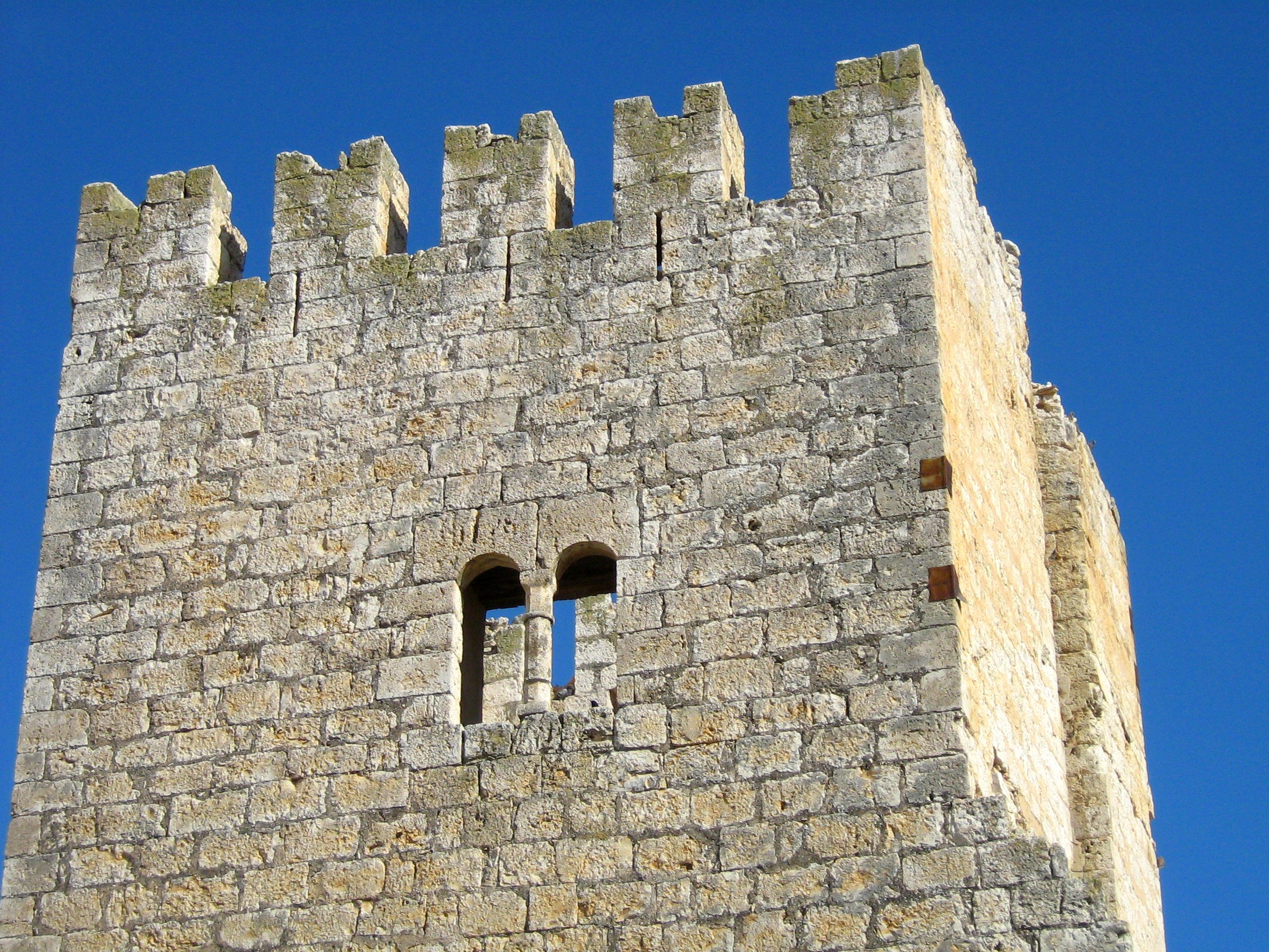 Curiel de Duero. Palacio de Zúñiga. Torre. Valle del Cuco. Valladolid